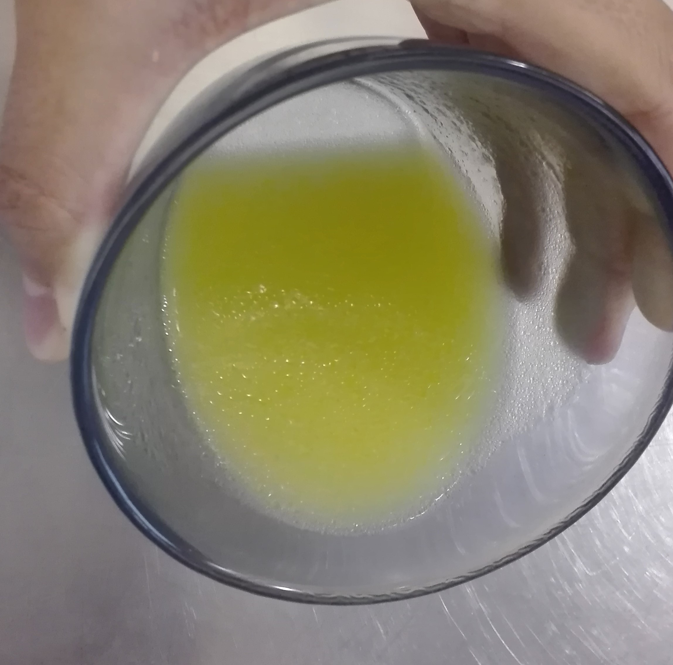 Sopa d'oli inclinada